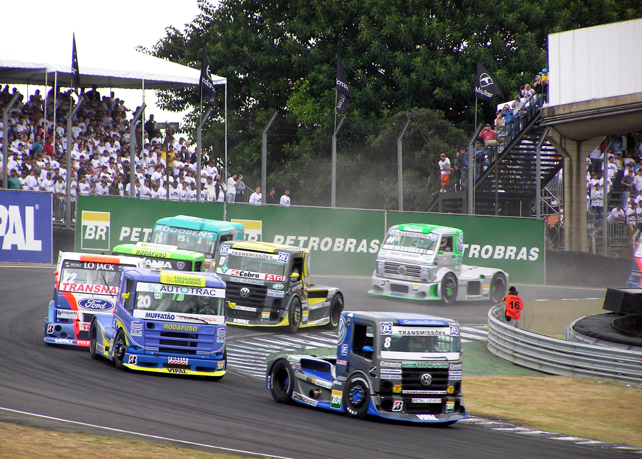 Fórmula Truck 2006 Rd.3 Interlagos: Volkswagen leads#8 Adalberto Jardim (Volkswagen)#20 Pedro Muffato (Scania)#22 Lui C. Zappelini (Ford)#17 Beto Napolitano (Volkswagen)#44 Herberto Heinen (Volkswagen)